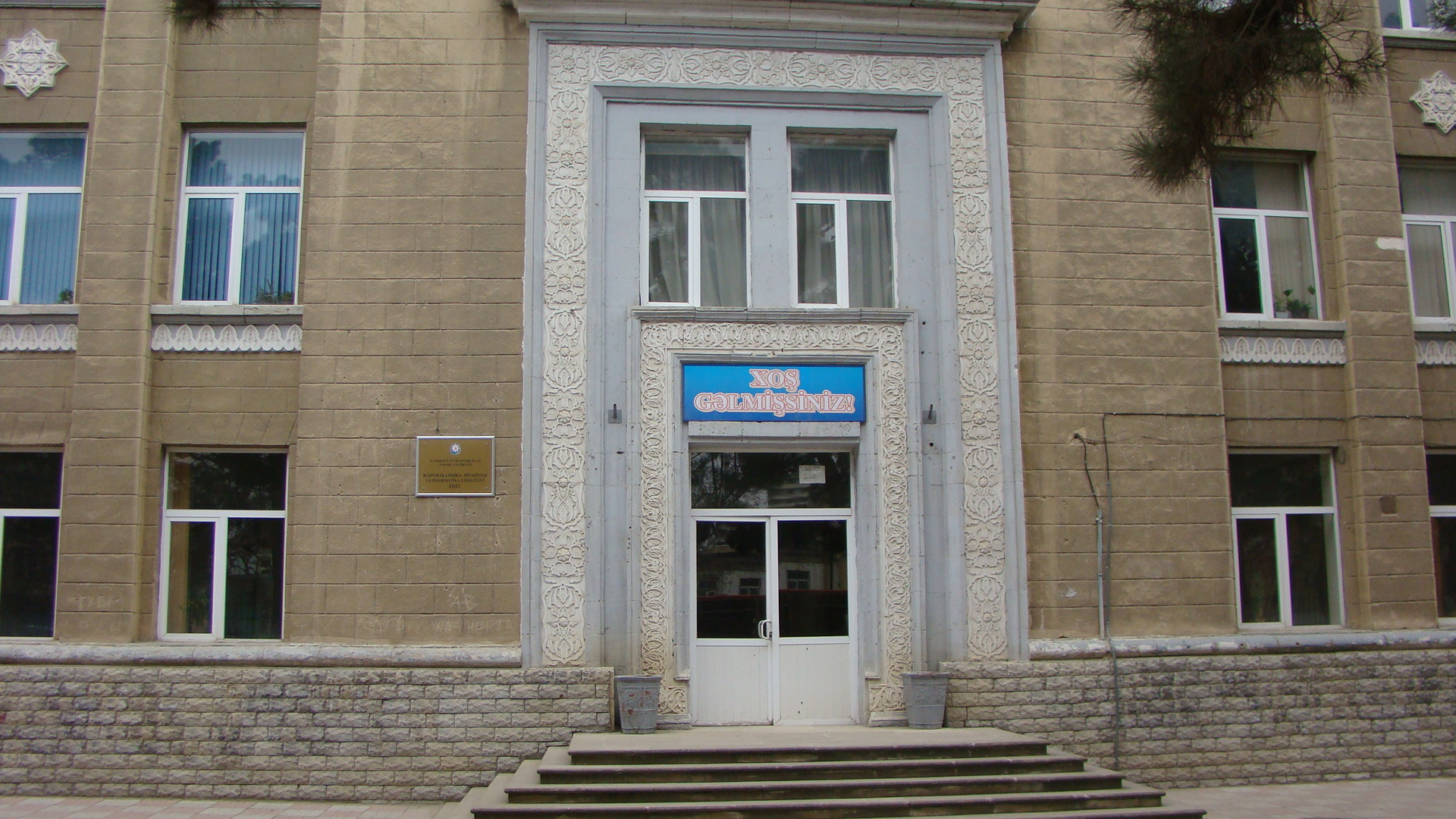 Fizika, Riyaziyyat və İnformatika Təmayüllü Liseyin binası